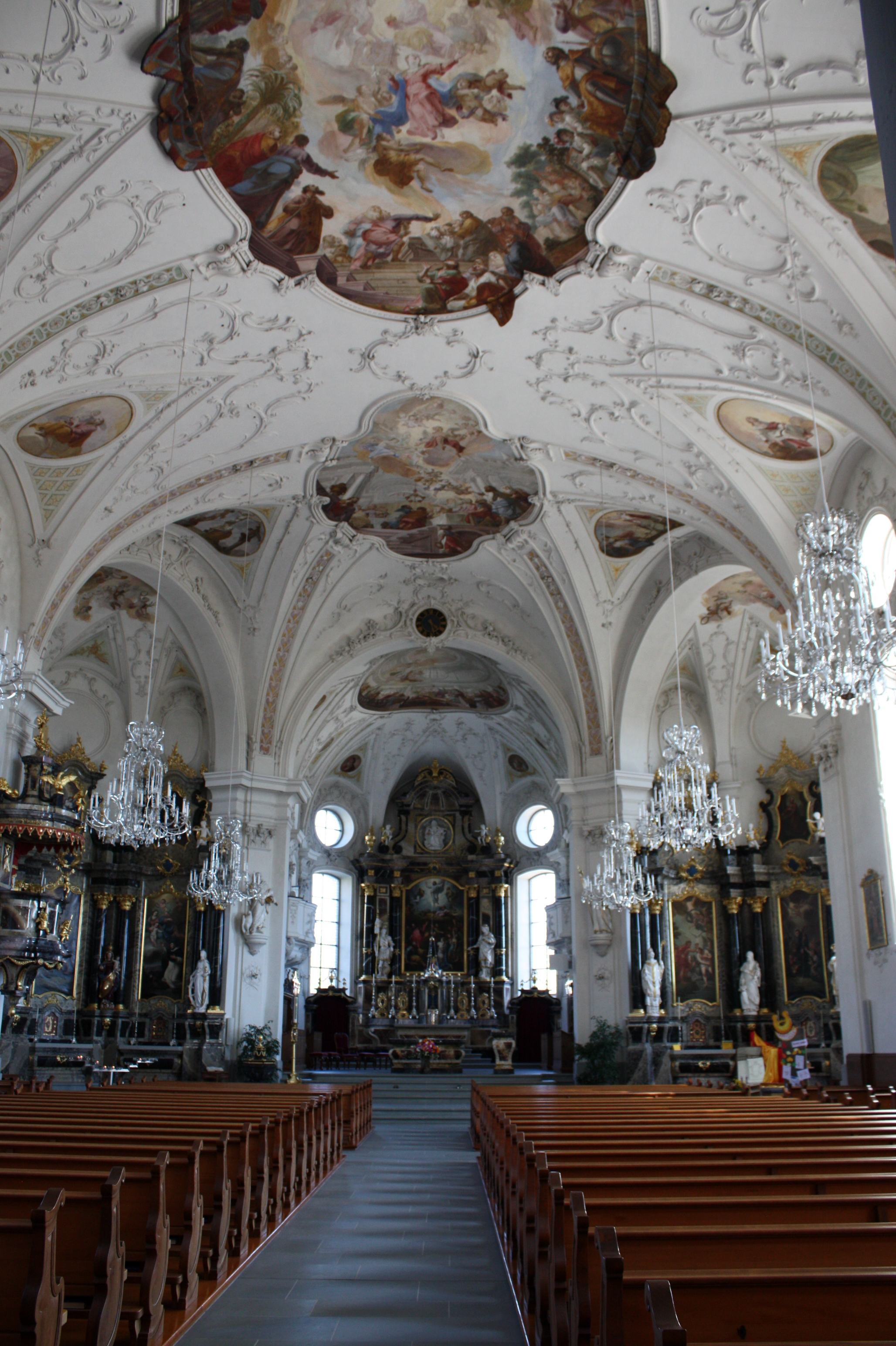 Kirche St. Mauritius, Ruswil (Innenansicht)